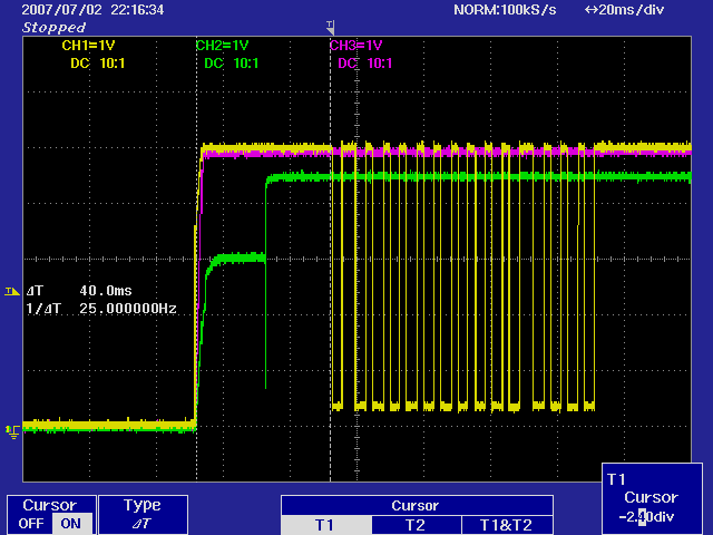 Mit einem DSO aufgezeichnetes Oszillogramm. Gut zu sehen: drei Kanäle in Gelb, Grün und Magenta jeweils mit Angabe des Auflösung (hier: 1V/Div) Triggerschwelle (kleines T am linken Bildrand) Triggerzeitpunkt (kleines T am oberen Bildrand, mitte) Zwei Messcursor-Marken T1 und T2 sowie Messergebnis (vertikale gestrichelte Linien, weisser Text am linken Rand) Angabe über Zeitachse (hier: 20ms/Div) Angabe der Abtastrate (hier 100ks/s also 100.000 Abtastungen pro Sekunde) Verwendete Tastköpfe (hier 10:1) Scope plot, made with a DSO and detailed data concerning resolution, cursor positions etc.